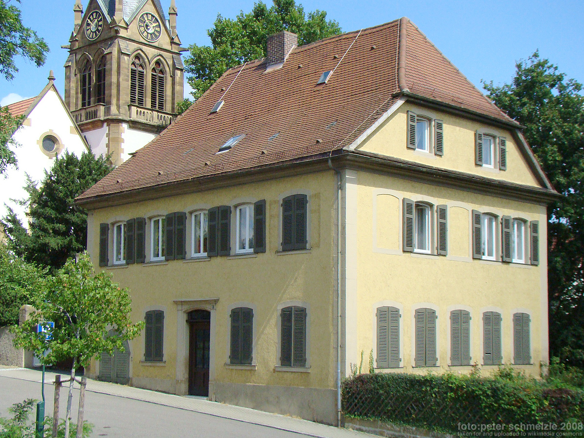 Denkmalgeschütztes evangelisches Pfarrhaus, KIrchsteige 8 in Heilbronn-Böckingen